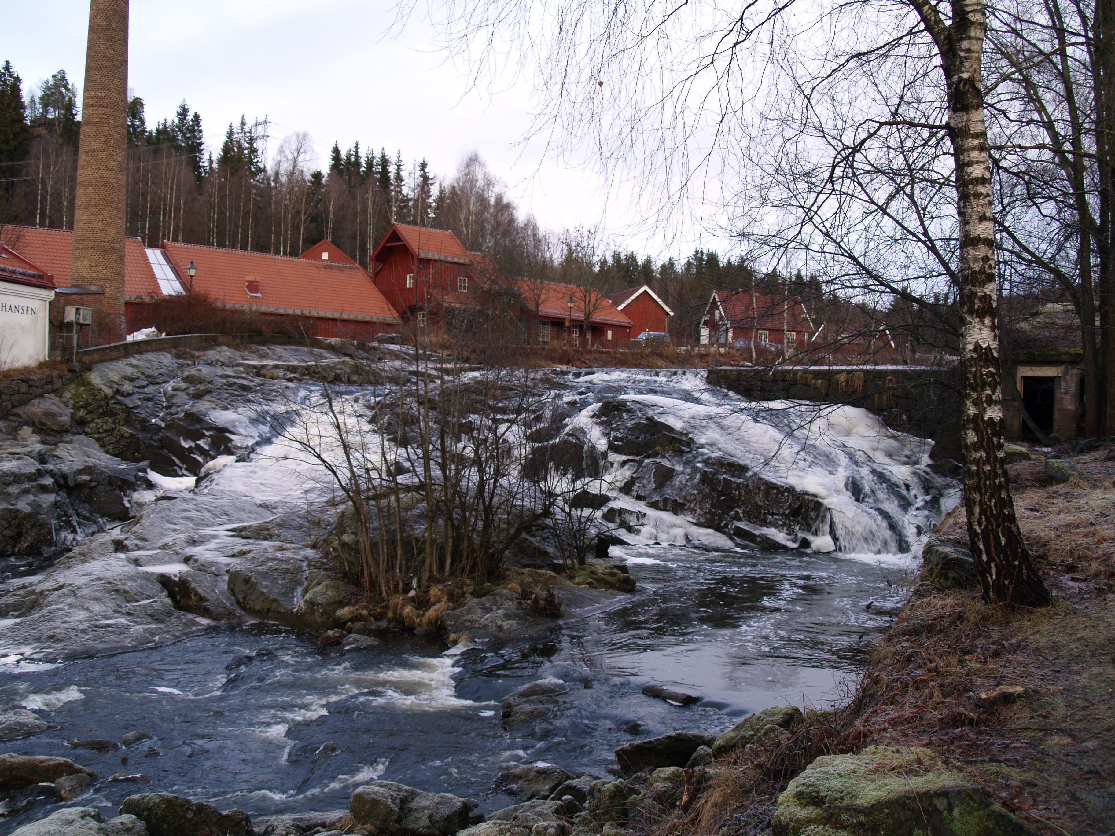 PC300378